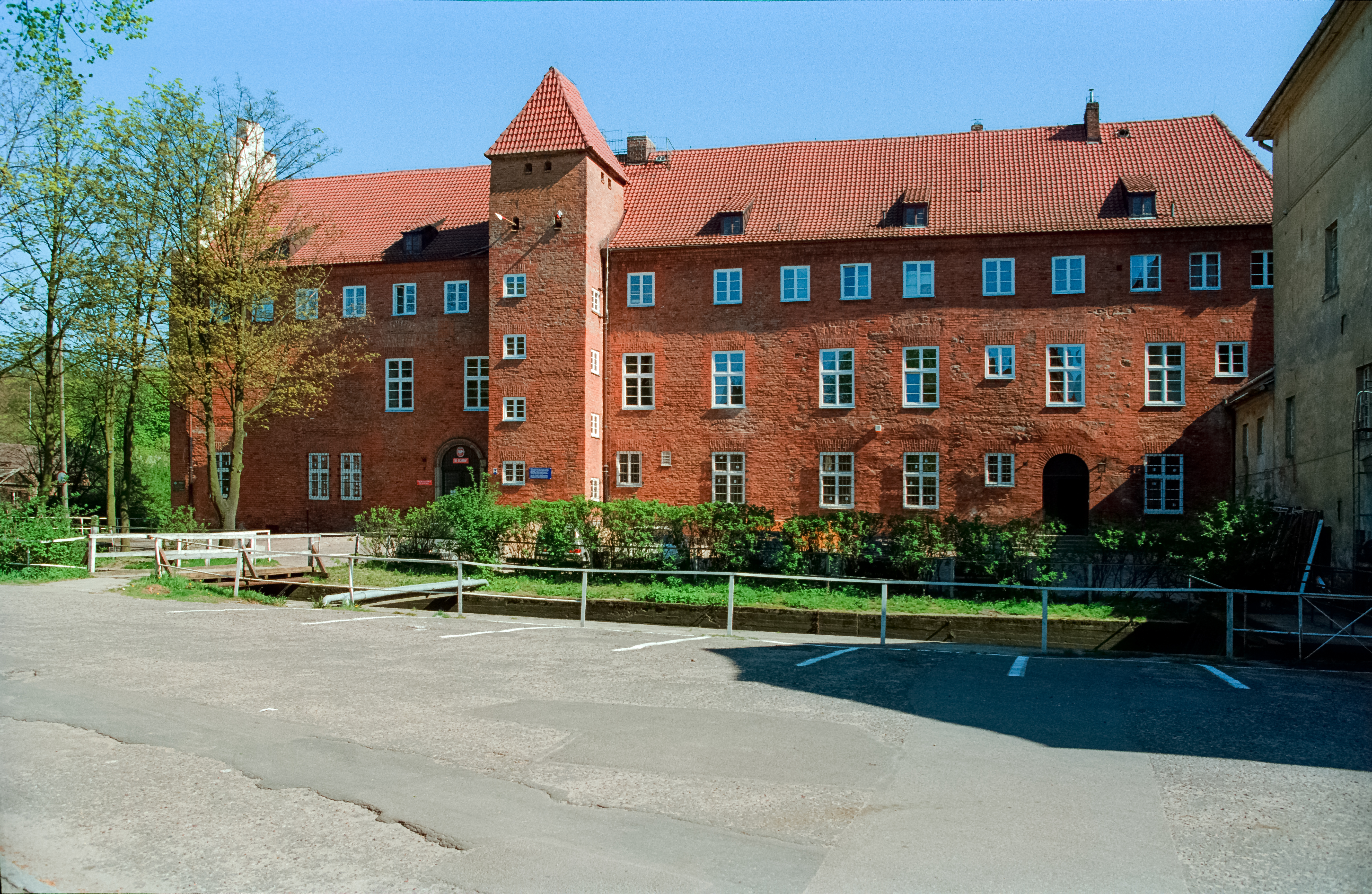 Lębork, gmach sądu, dawny zamek